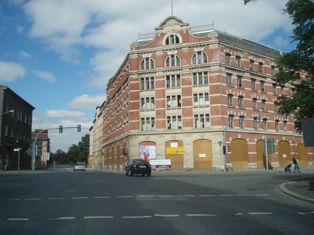 Naethers Fabrikgebäude in Zeitz